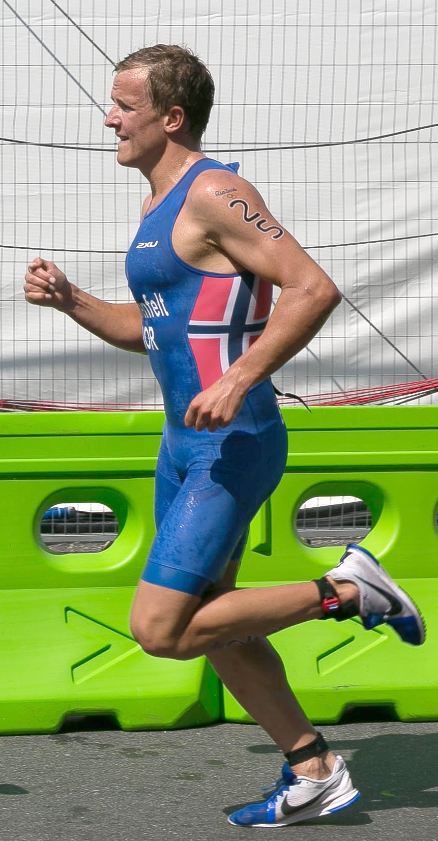 Atletas do Triatlo Masculino durante corrida, Copacabana , Rio de Janeiro